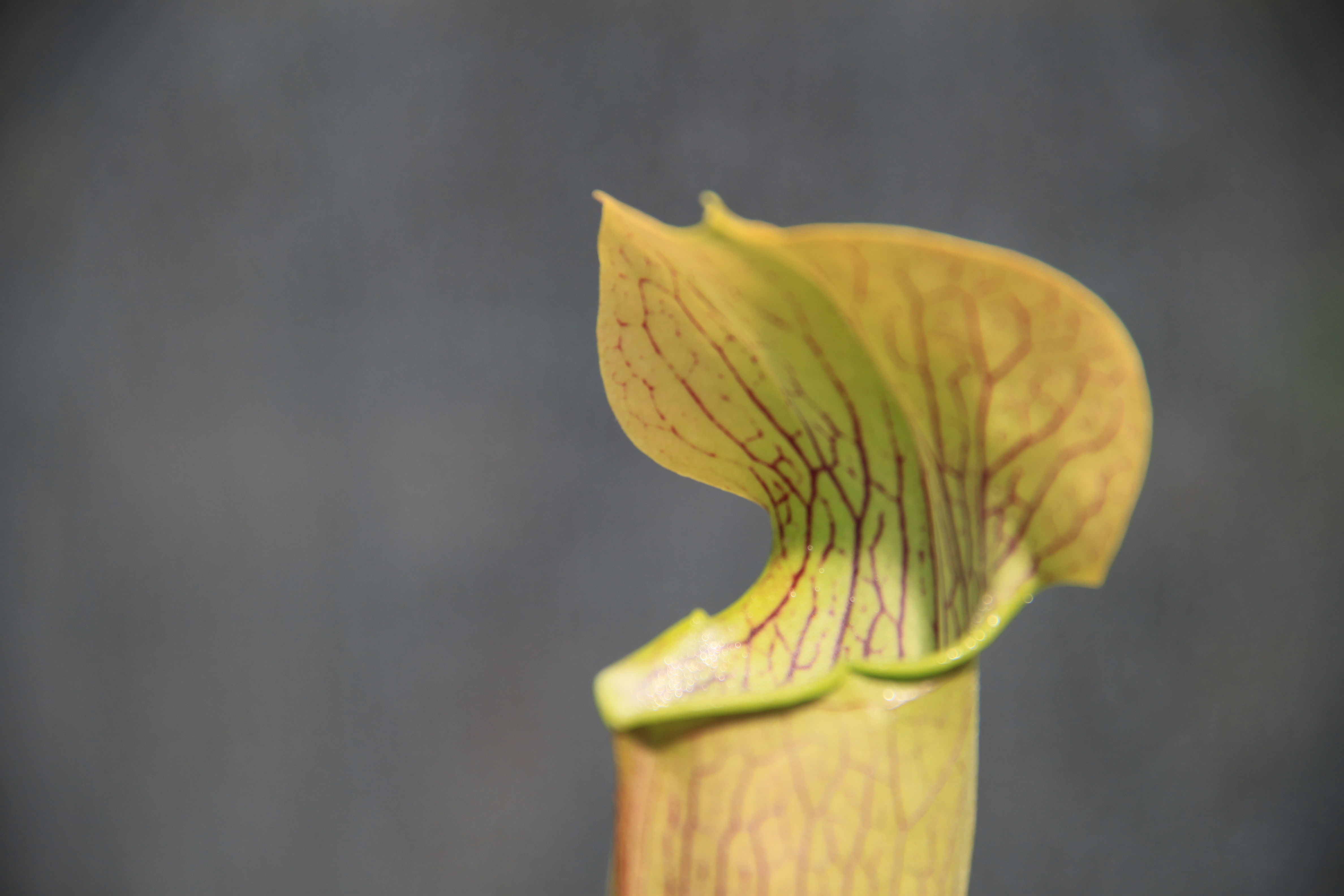 Muséum de Toulouse Native nameMuséum de ToulouseLocationToulouse, FranceCoordinates43° 35′ 37.89″ N, 1° 26′ 57.42″ E Established1796: established ; 1865: opened to publicWeb page control : Q422 VIAF: 130895847 ISNI: 0000 0001 2158 3469 SUDOC: 028667107 BNF: 120455376 Museofile: M7013 institution QS:P195,Q422